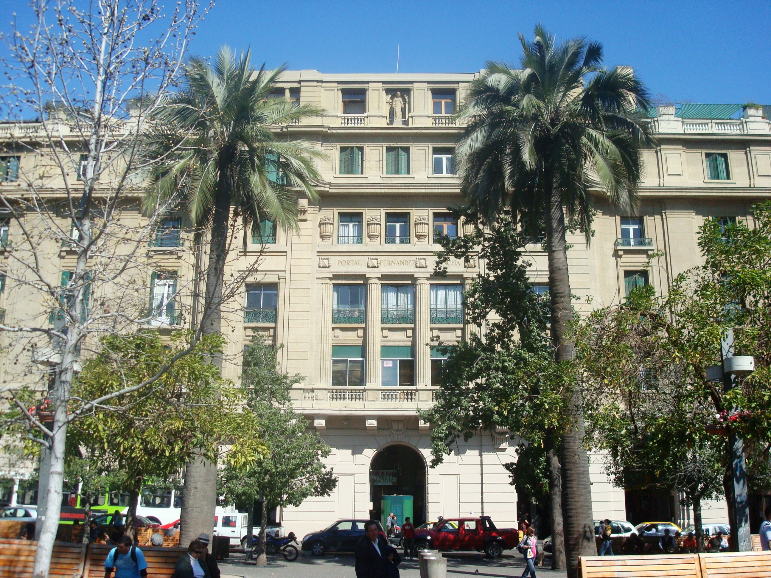 Portal Fernandez Concha, Santiago de Chile